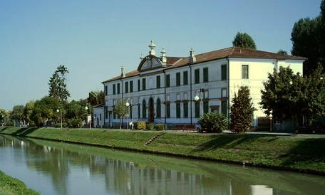 Facciata principale di Villa Nani-Mocenigo sul Naviglio del Brenta